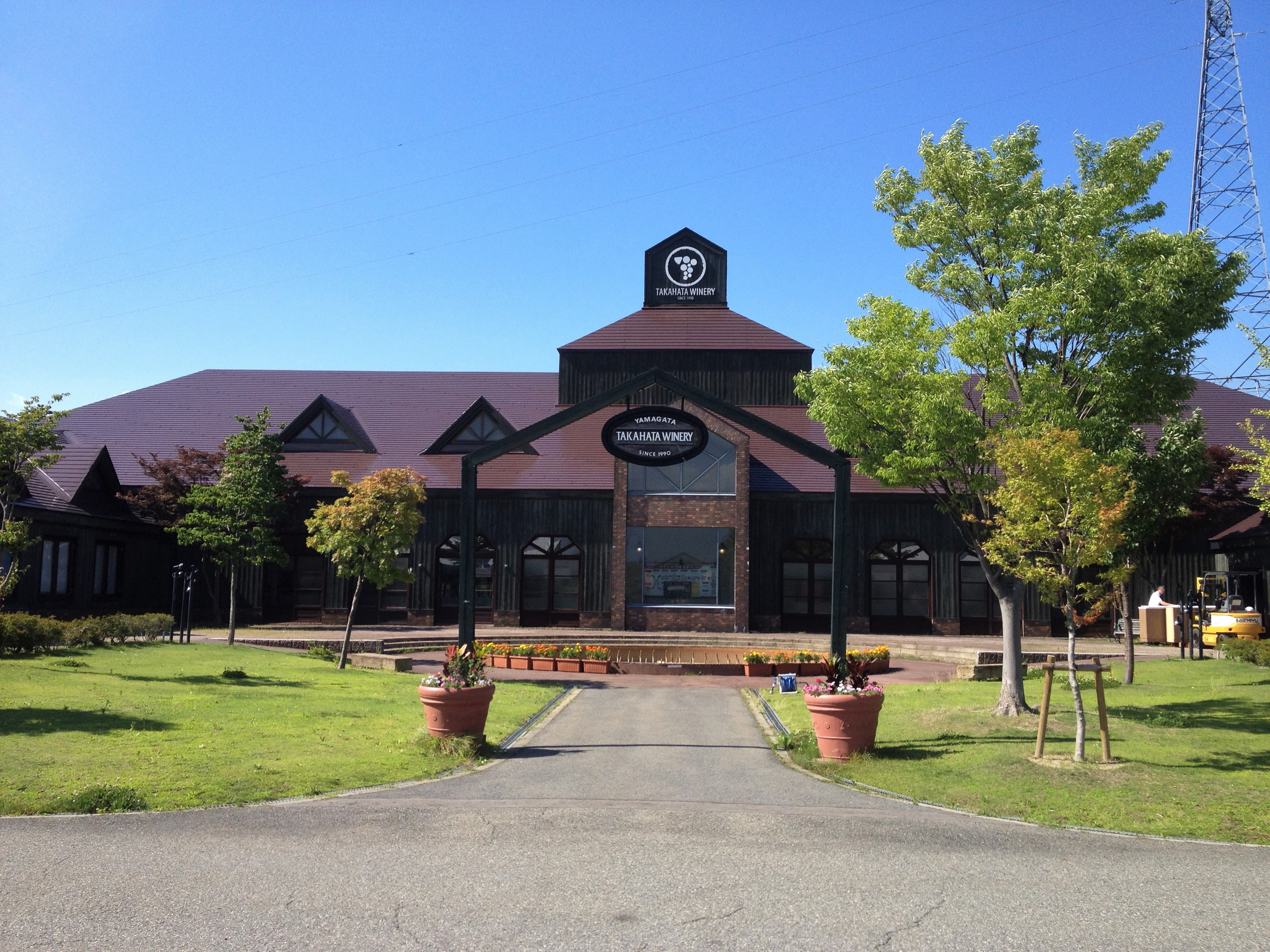 高畠ワイナリー・醸造所部分